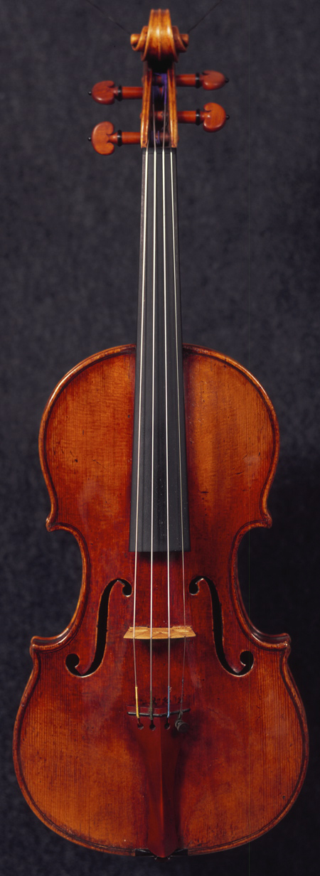 bellisimo violin 1713